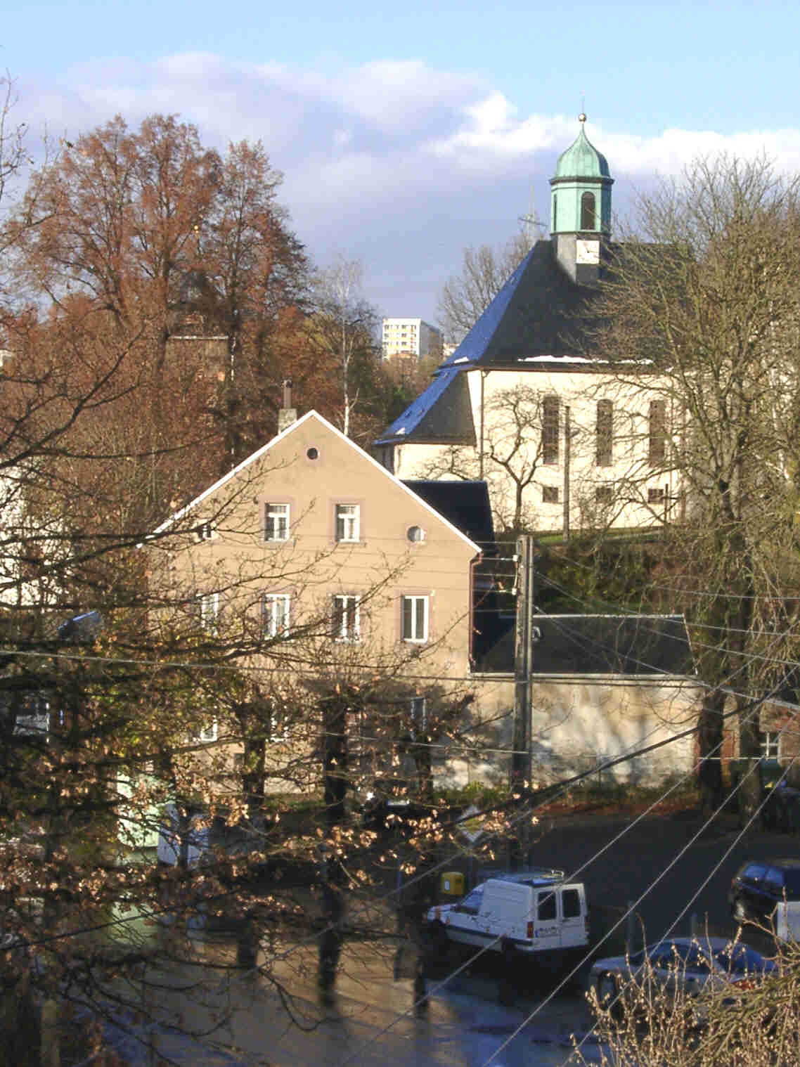 Kirche in Neukirchen (Erzgebirge) im Herbst 2004